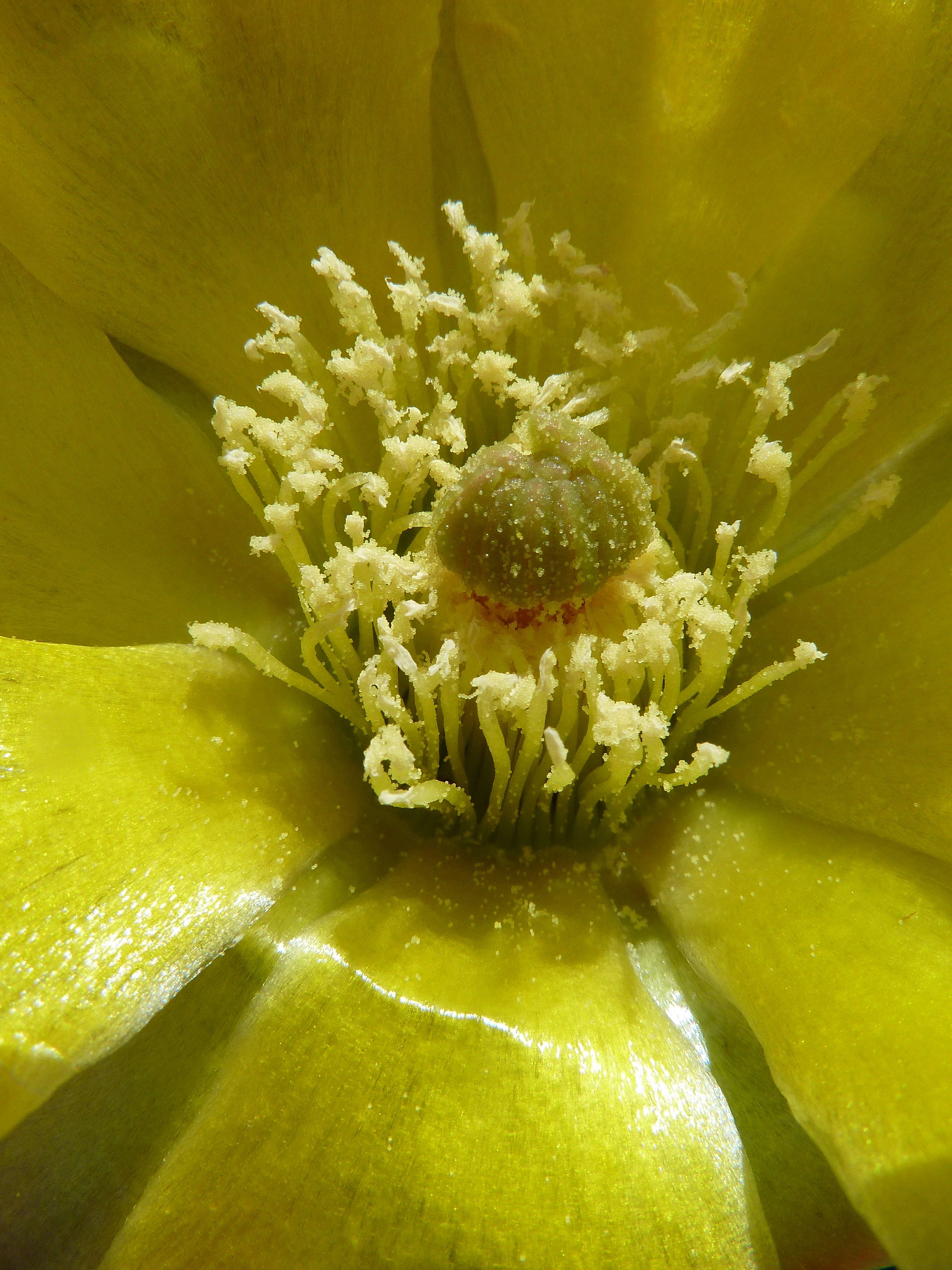 Opuntia ficus-indica (Chumbera) : Flor: detalle de los órganos reproductores (anteras numerosas y estilo con estigma múltiple) - Camino de San Cayetano, Albatera (Alicante, España)